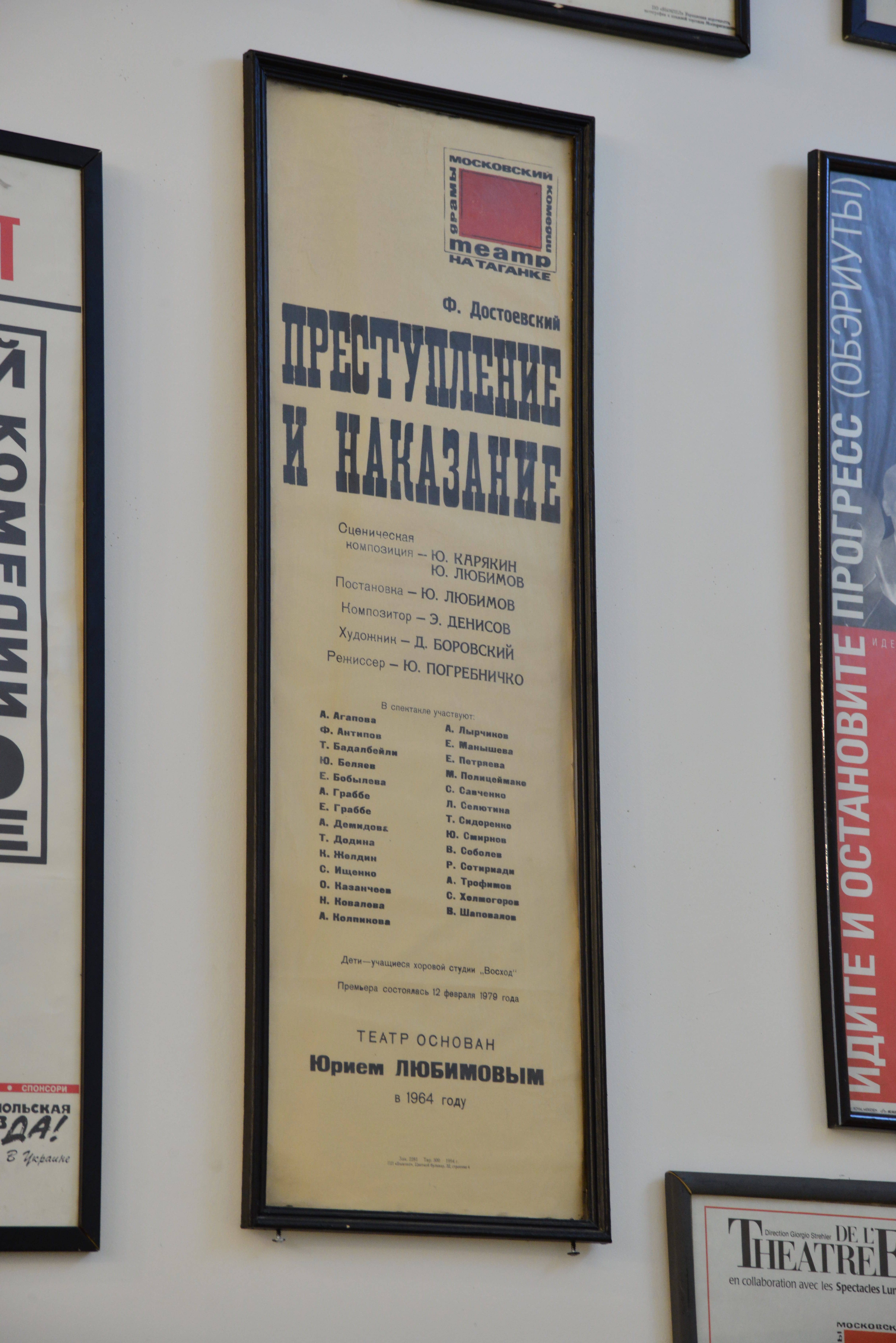 Театр на Таганке. Афиши